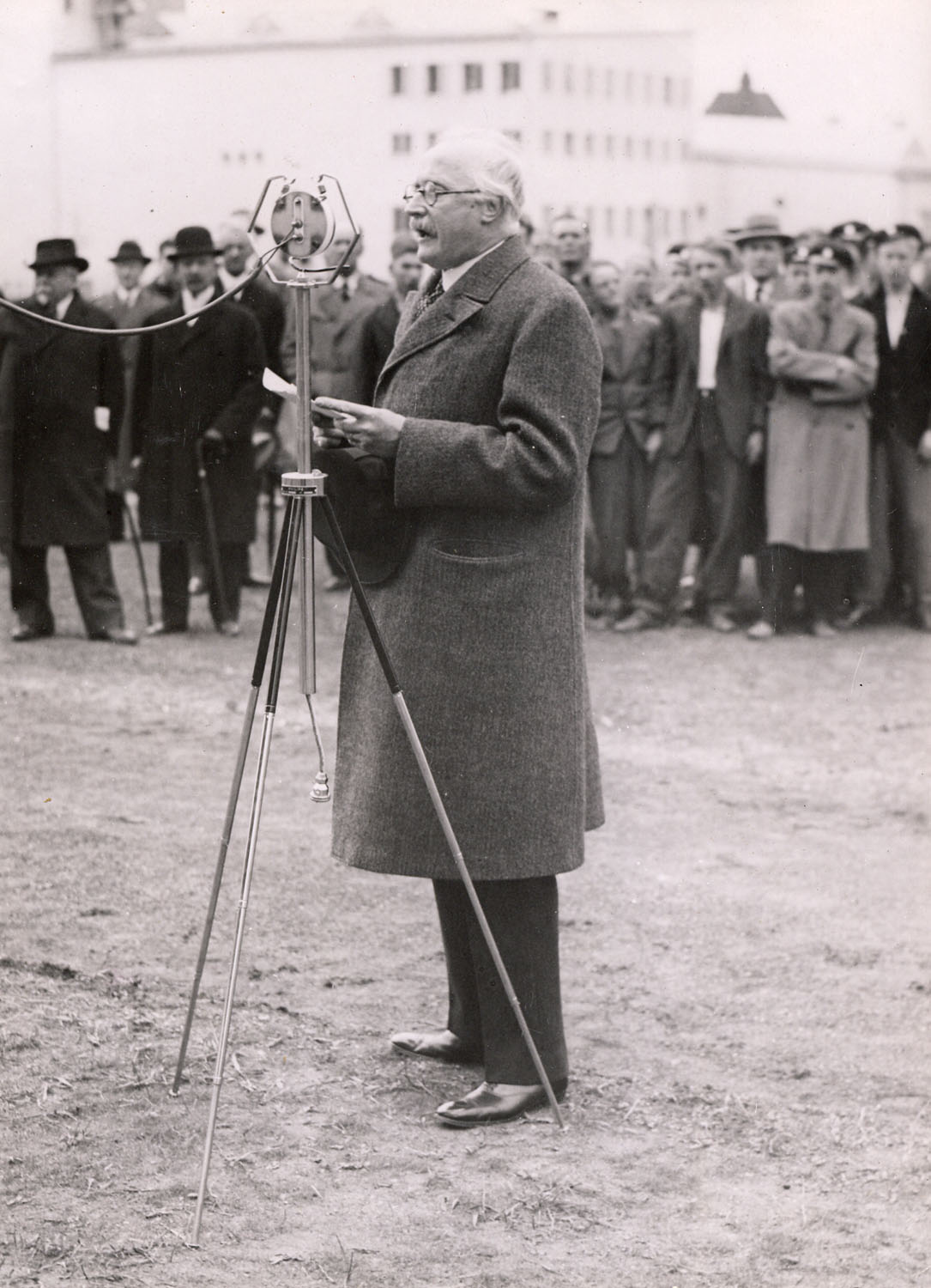 Kristinebergs Idrottsplats invigs. Invigningstal av borgarrådet Oscar Larsson, 25 maj 1933